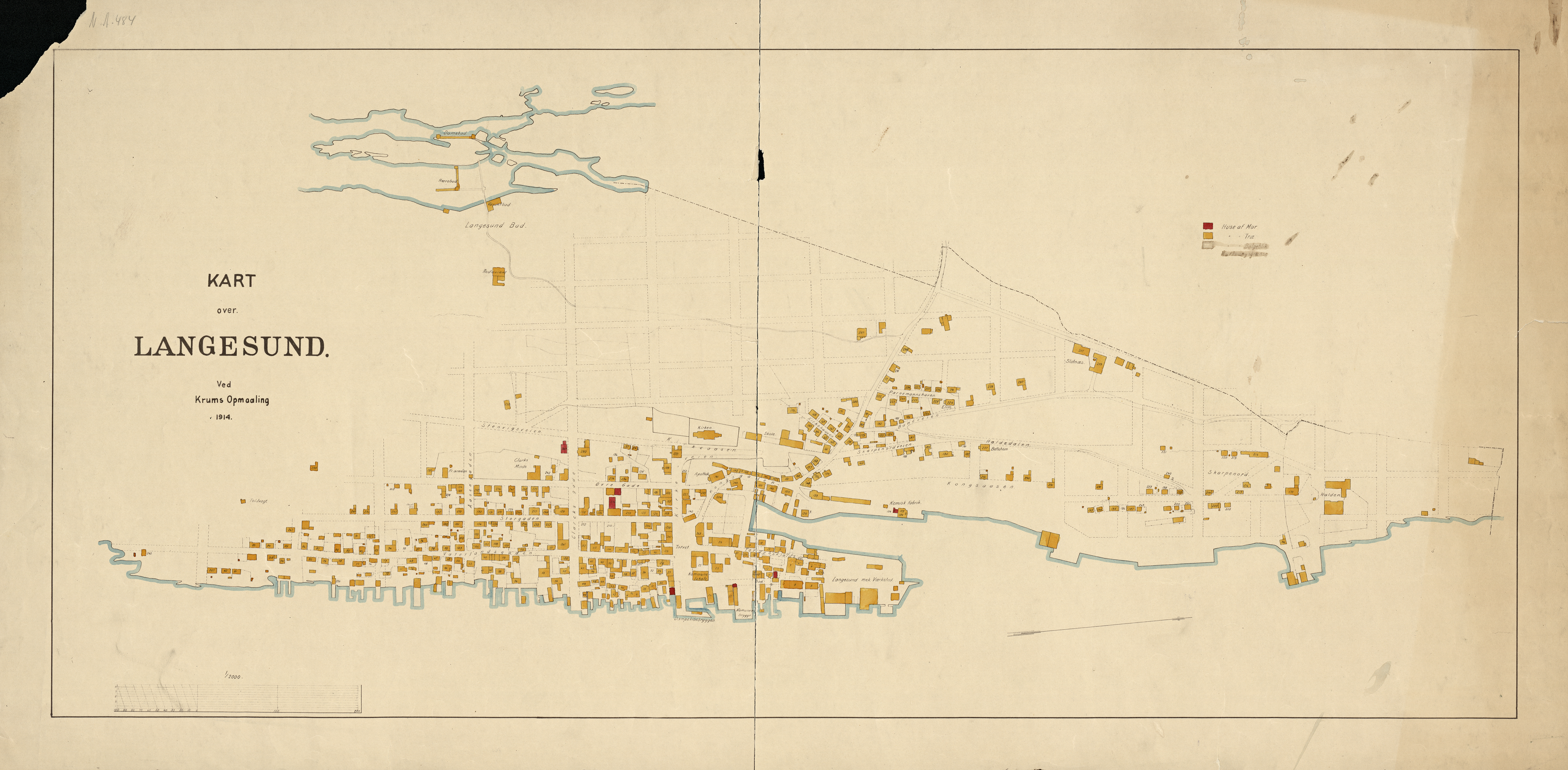 NS Krums kart over Langesund fra 1914.